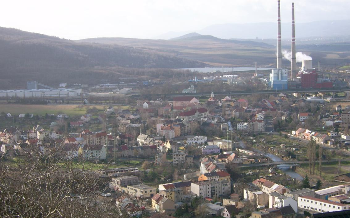 Celkový pohled na Trmice od Hostovic